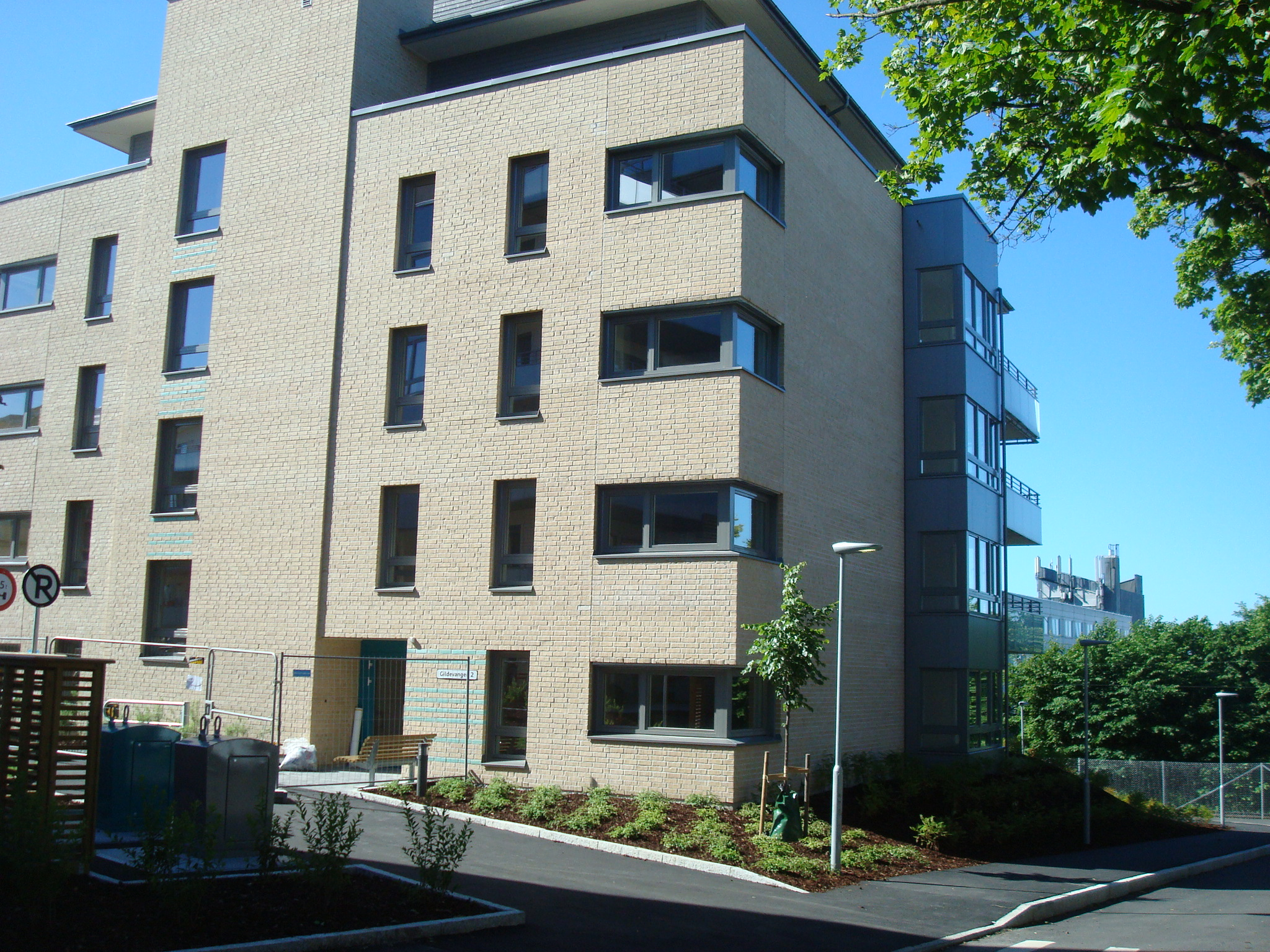 Gildevangen (nr. 2) på Løren i Oslo (juni 2014).